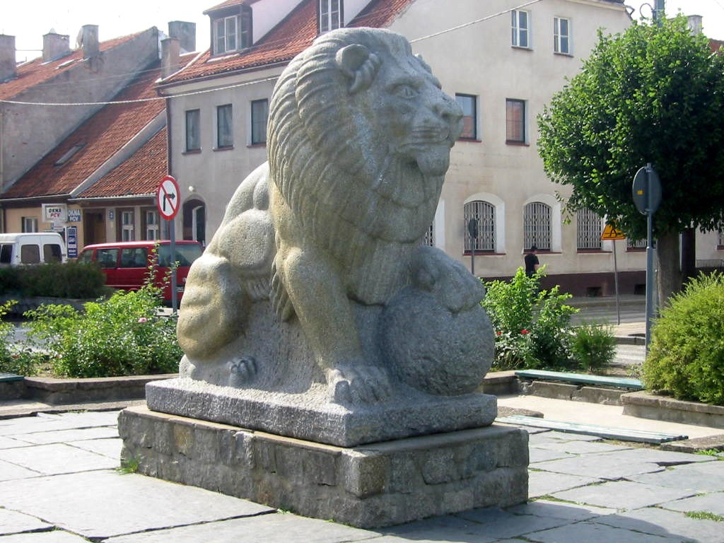 Olsztynek, Rynek - statua kamiennego lwa